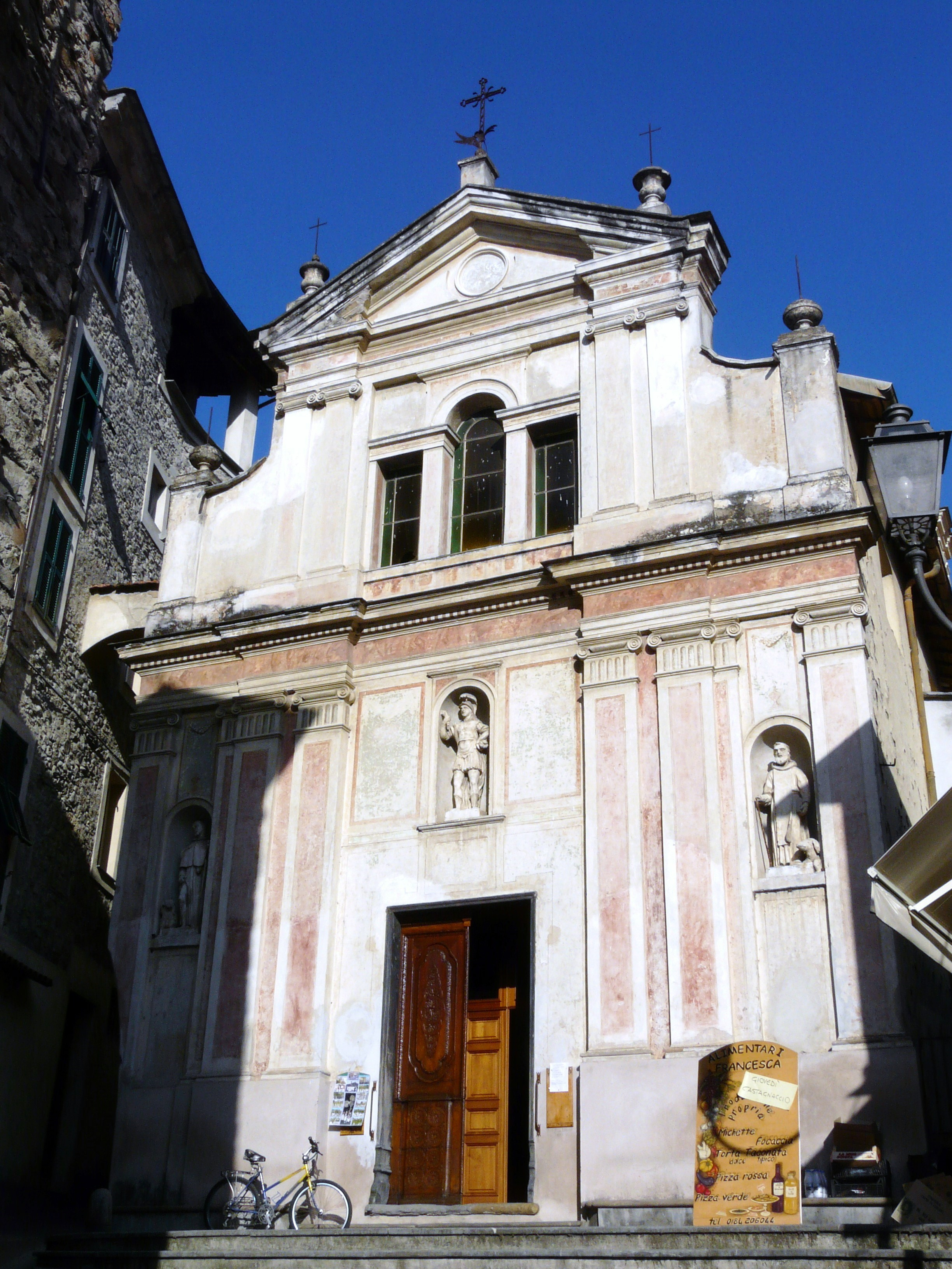 Facciata dell'oratorio di San Sebastiano, Dolceacqua, Liguria, Italia